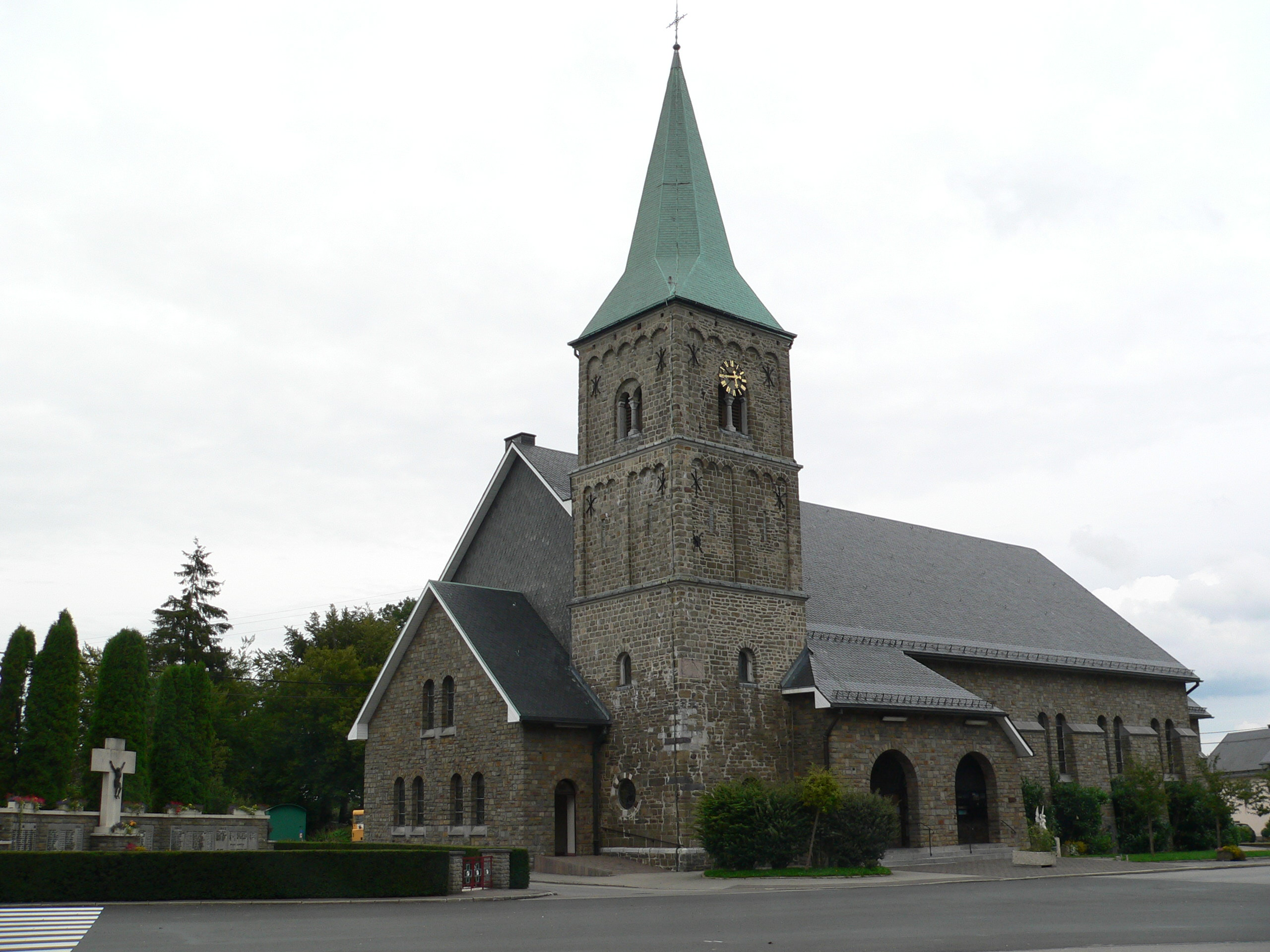 Pfarrkirche in Weywertz (OT von Bütgenbach) - Belgien, Links die Gedenkstätte für die Kriegsopfer der beiden Weltkriege